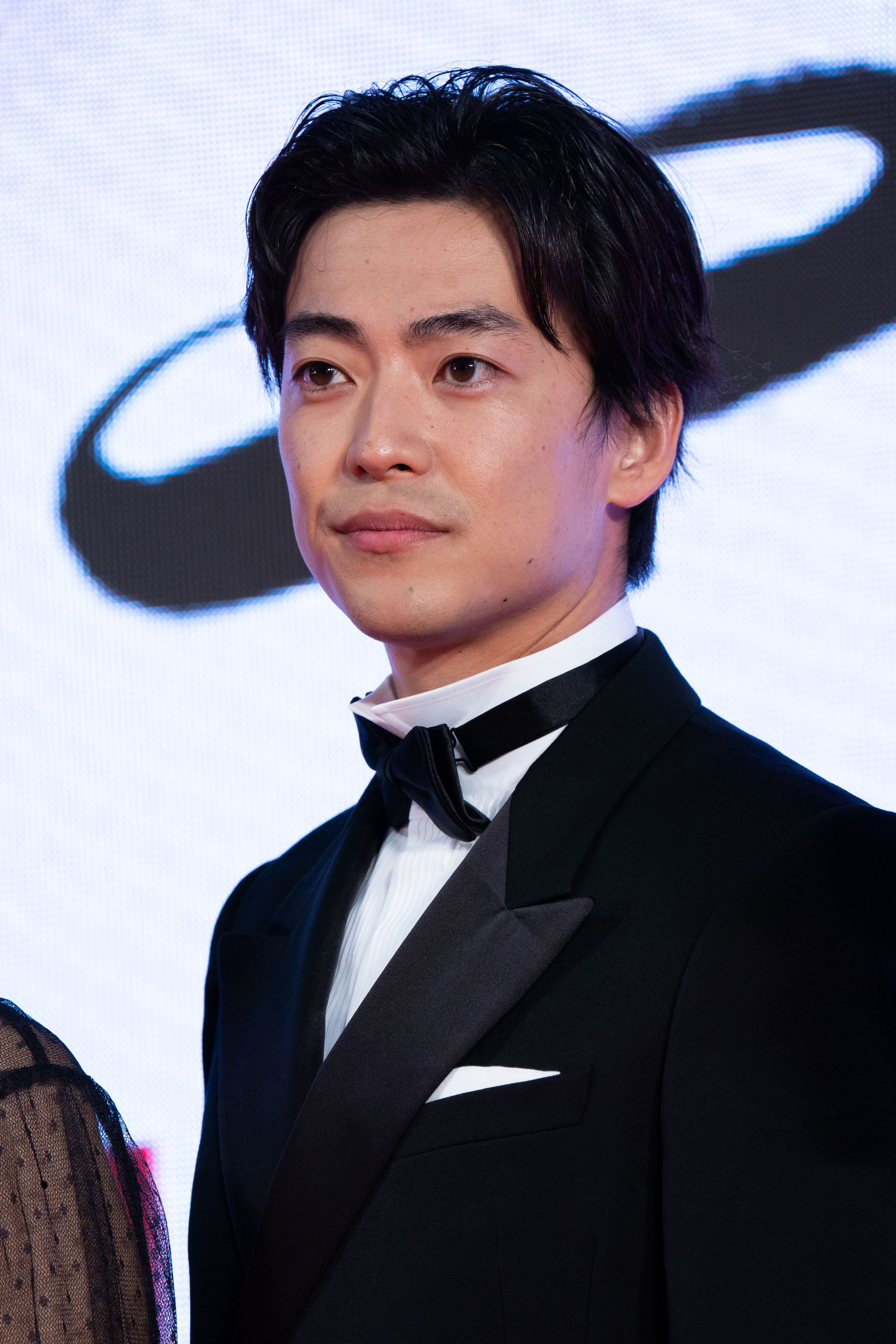 第32回 東京国際映画祭 オープニングセレモニー 大東駿介 (37セカンズ)